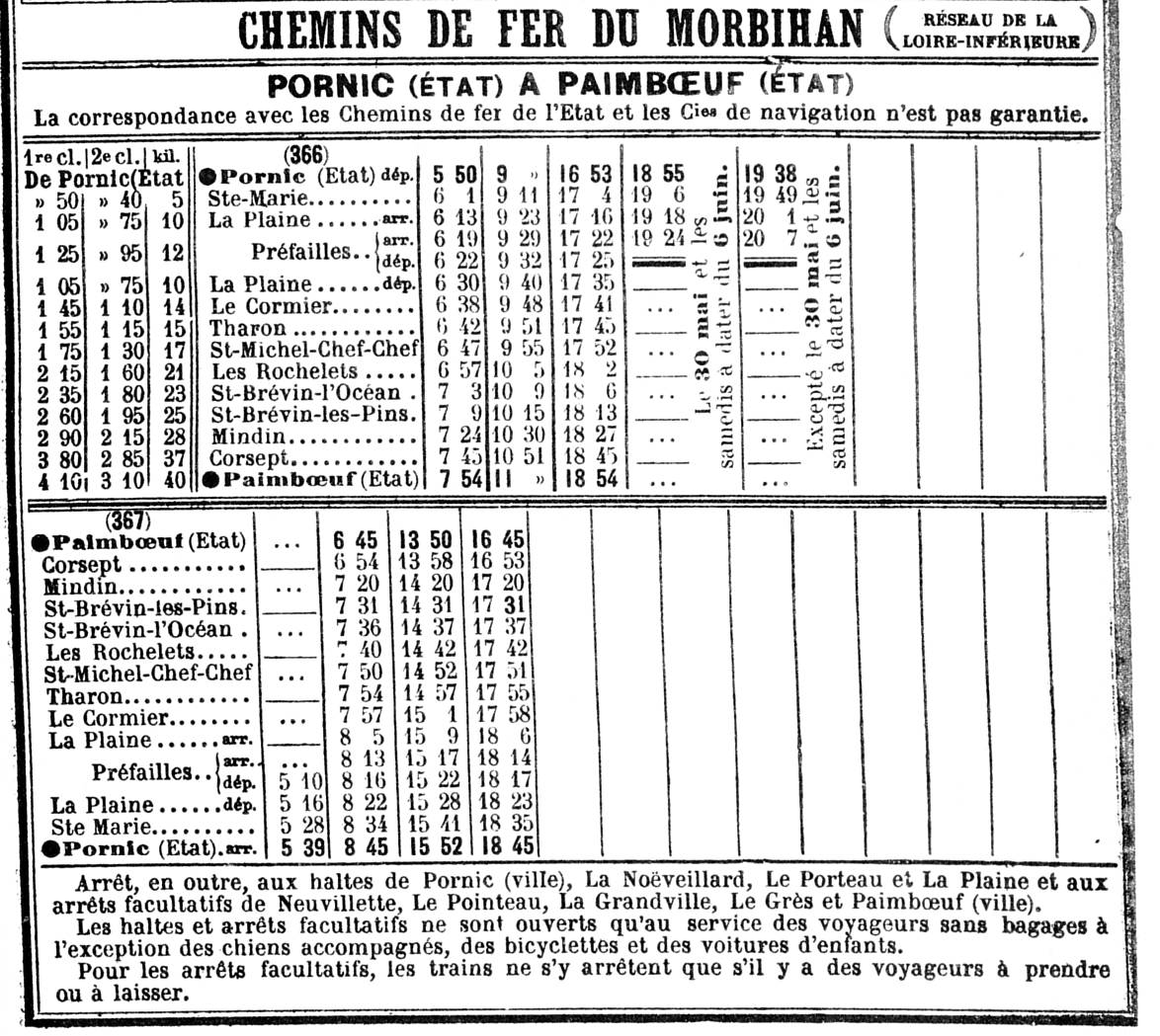 Livret horaire des Chemins de fer du Morbihan - Département de la Loire inférieure